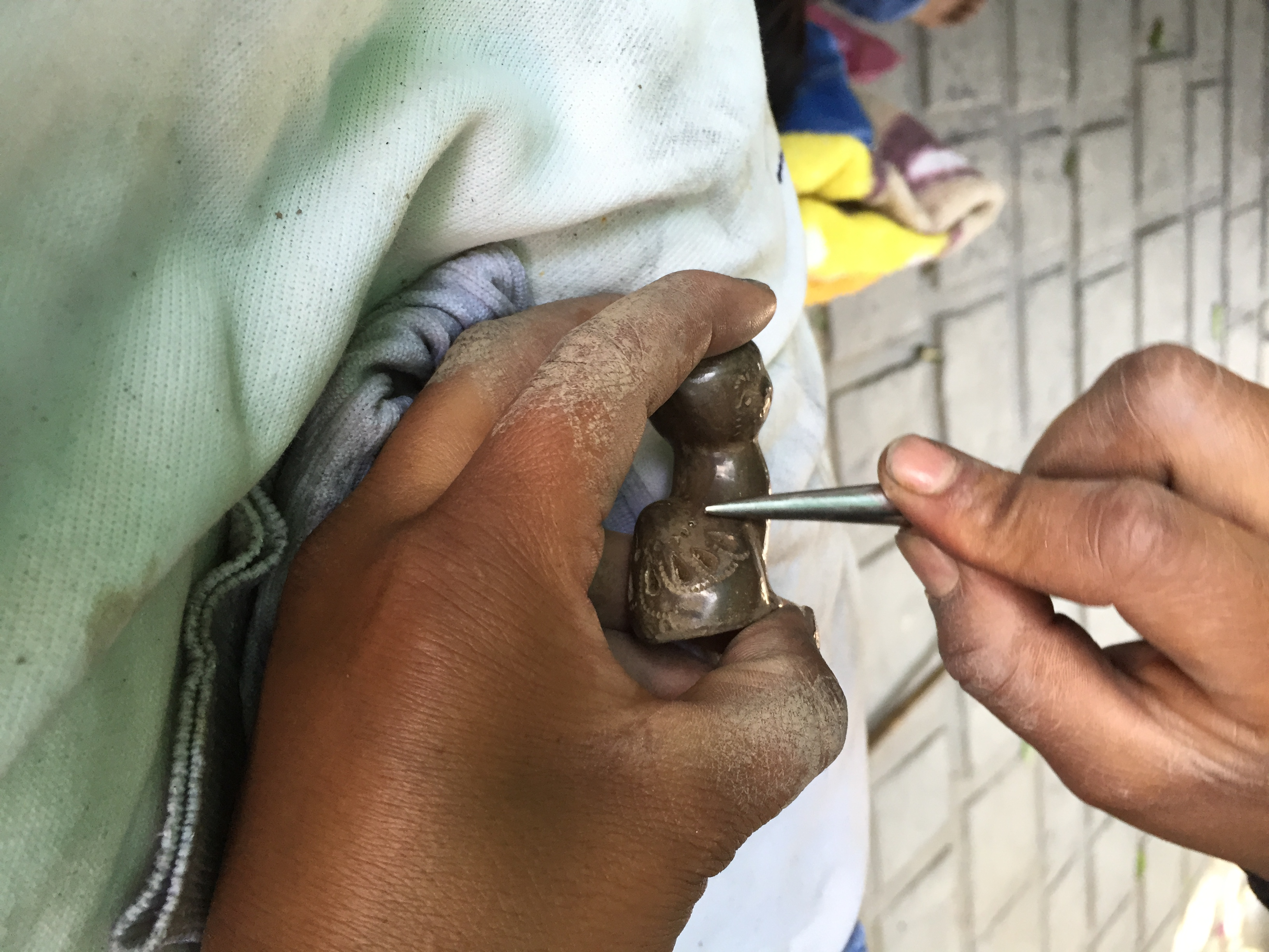 Para que el barro negro, después de ser cocido, tenga un acabado negro brillante, debe de ser pulido, cuando esta prácticamente seco, con una piedra de cuarzo o algún otro objeto liso.